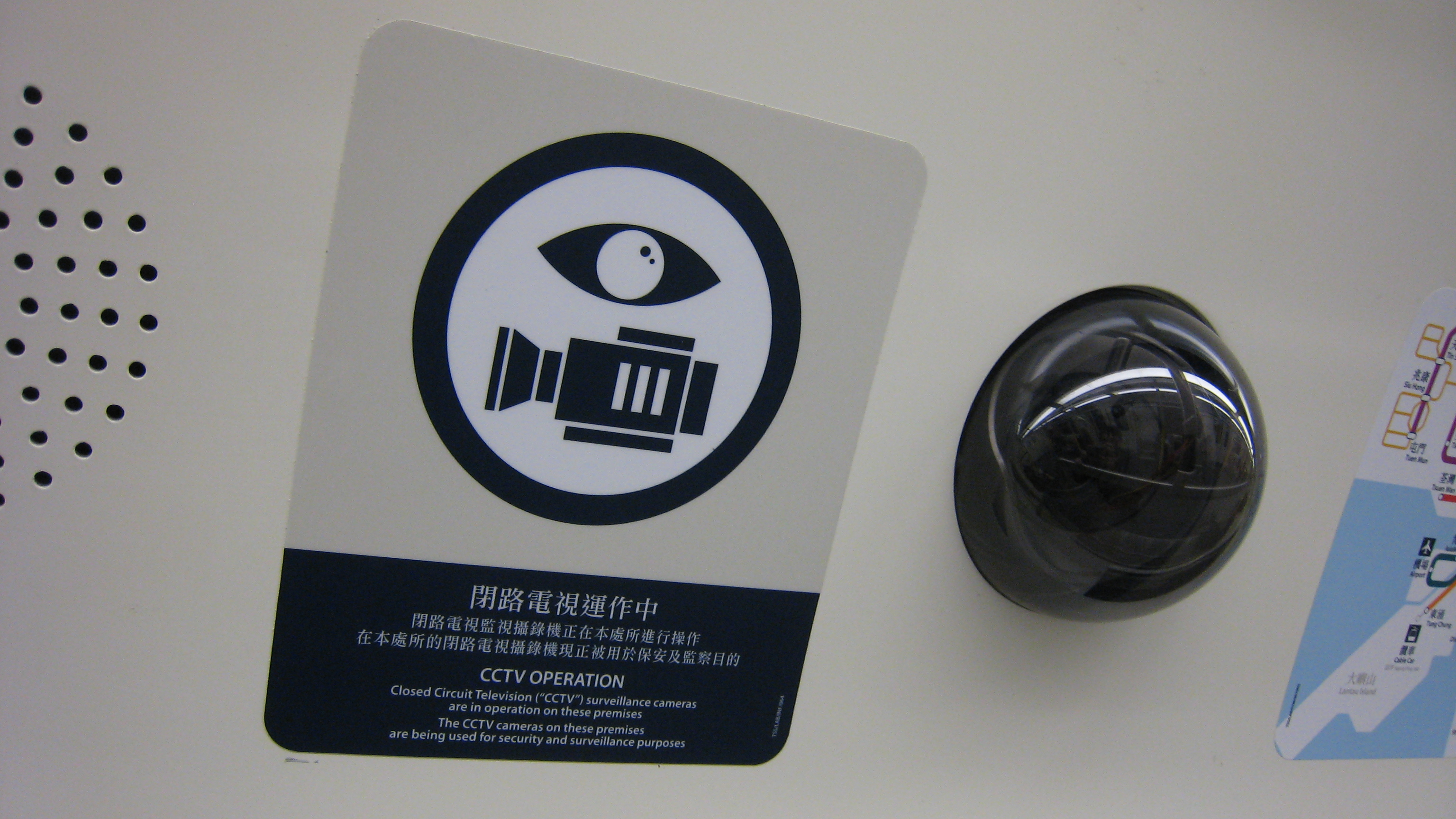 C-Train的閉路電視